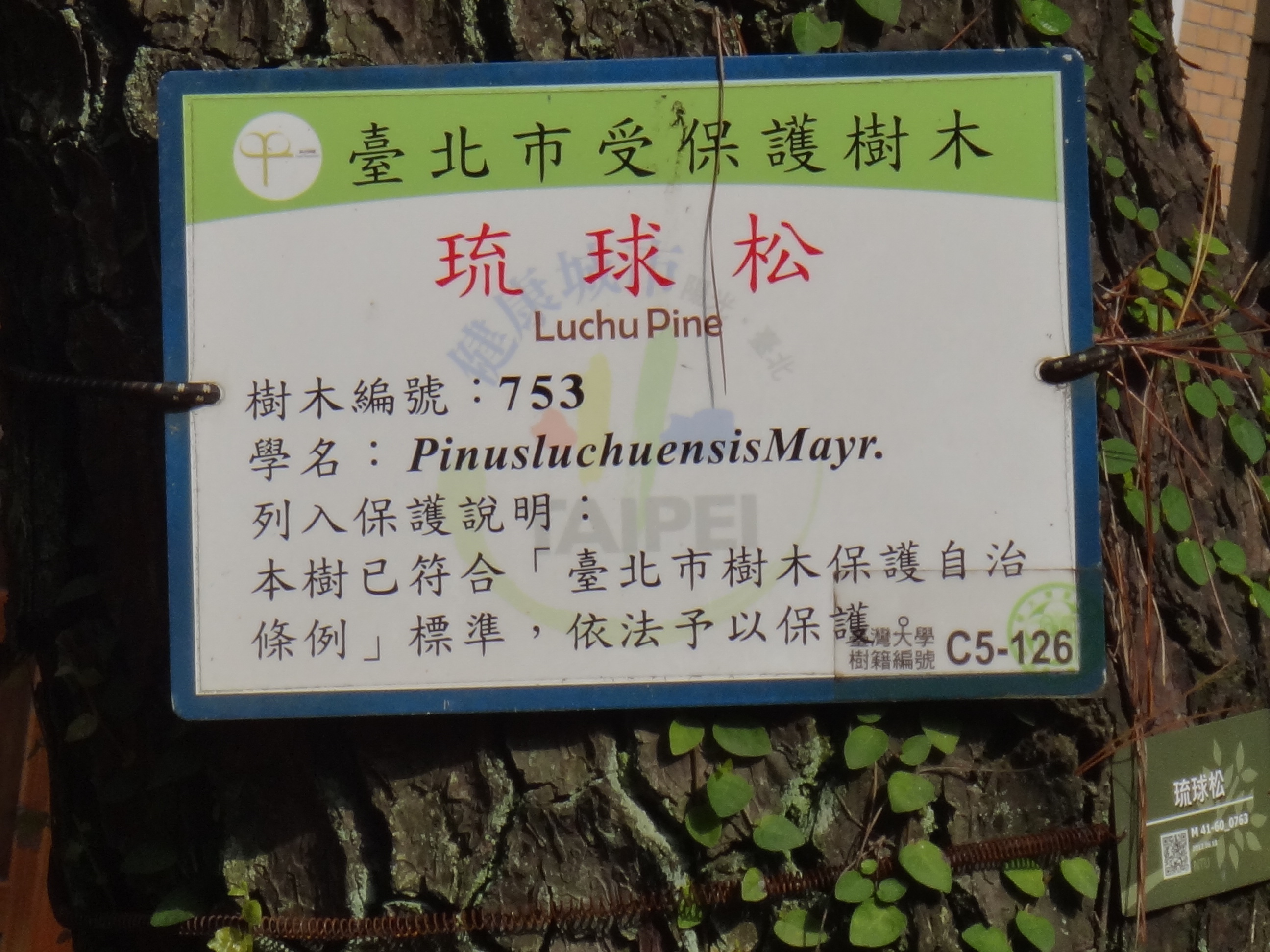 國立臺灣大學共同三松樹幹綑綁的臺北市受保護樹木琉球松解說牌，臺北市政府設置，右下角貼國立臺灣大學樹籍編號貼紙。